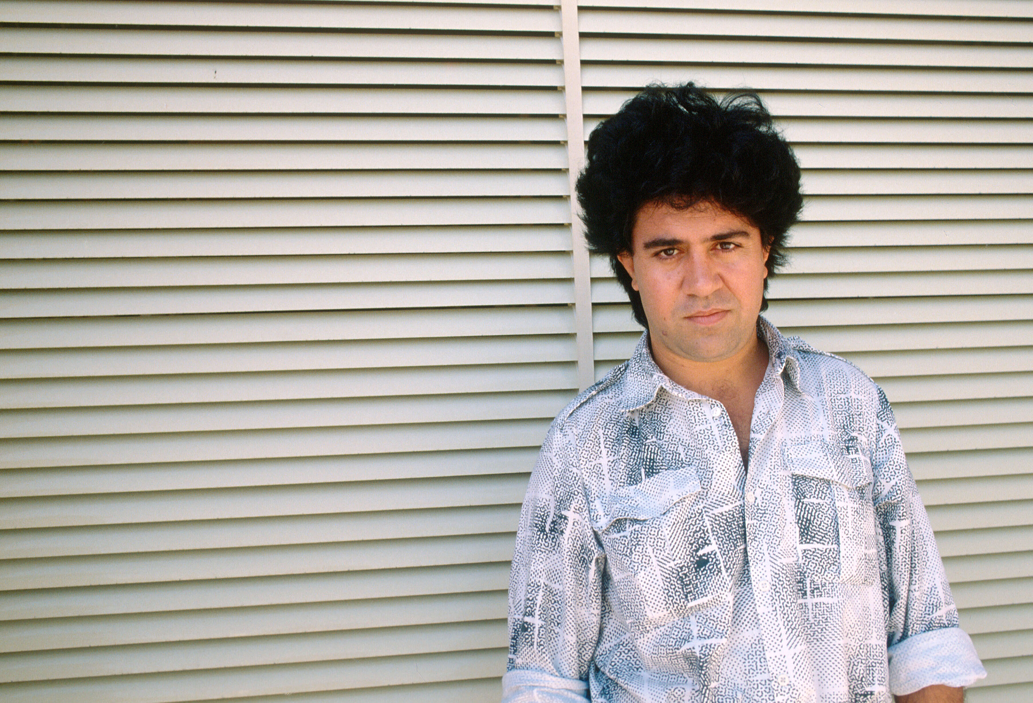 Il regista Pedro Almodovar alla Mostra del cinema di Venezia del 1988